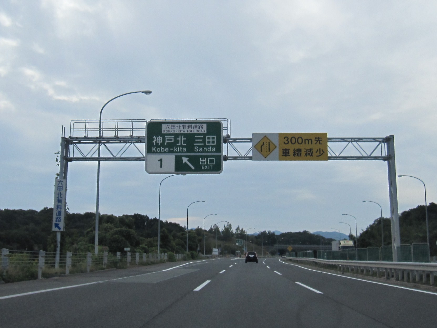 神戸北インターチェンジ案内板